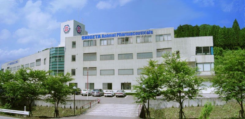 シゲタ動物薬品工業の本社外観写真